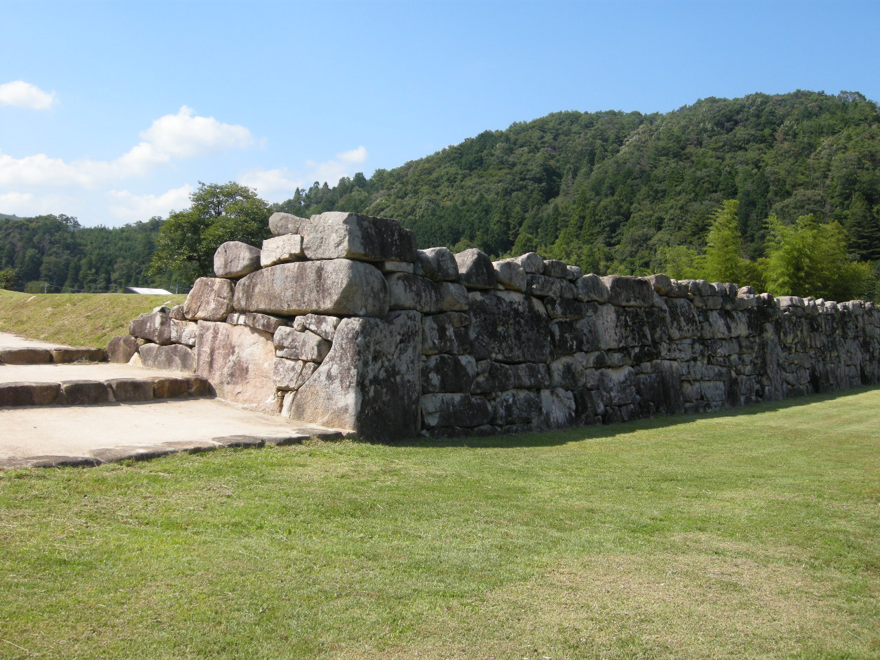 吉川元春館跡 Kikkawa Ruins